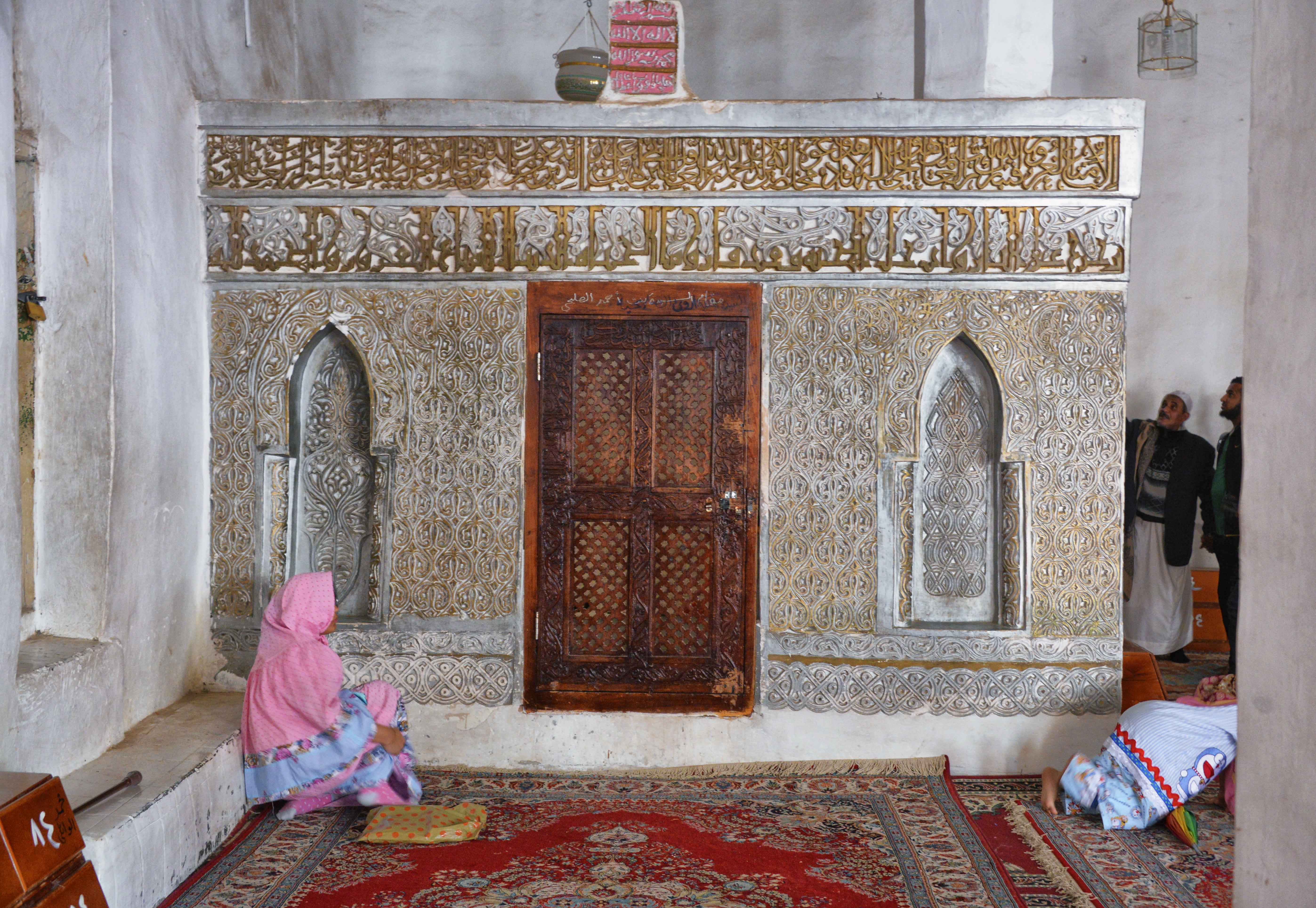 Yemen